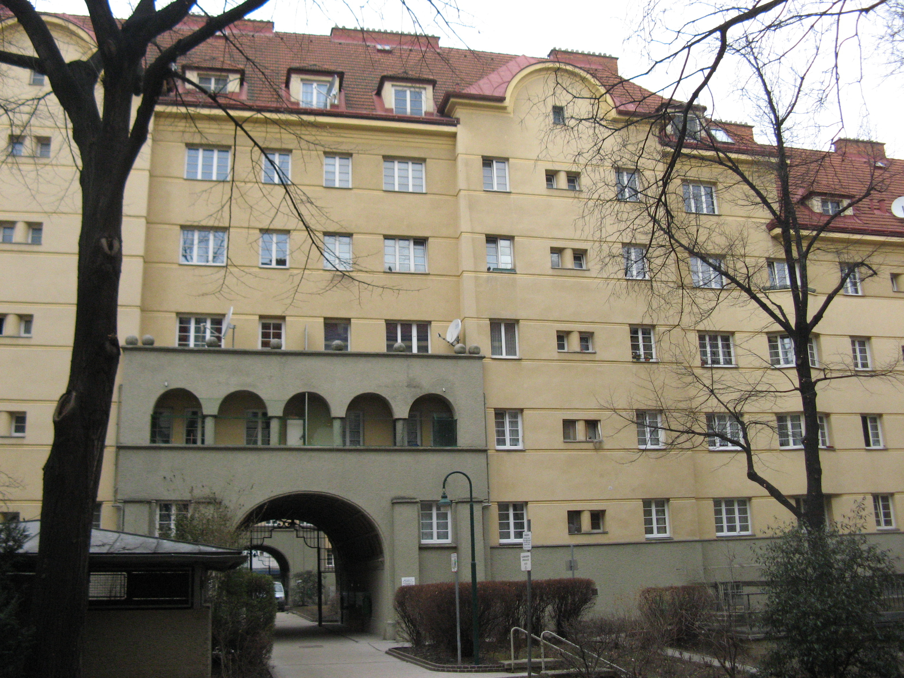 Jean-Jaurès-Hof (1925-27), Neilreichgasse 105, Wien-Favoriten